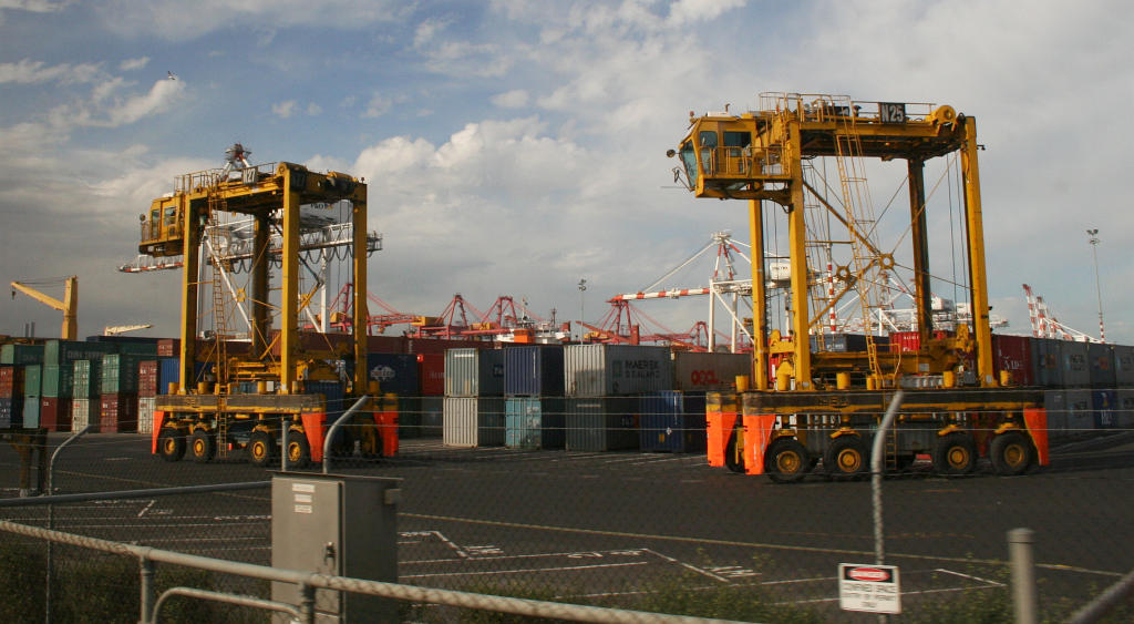 Melbourne - container carrier at swanson dock